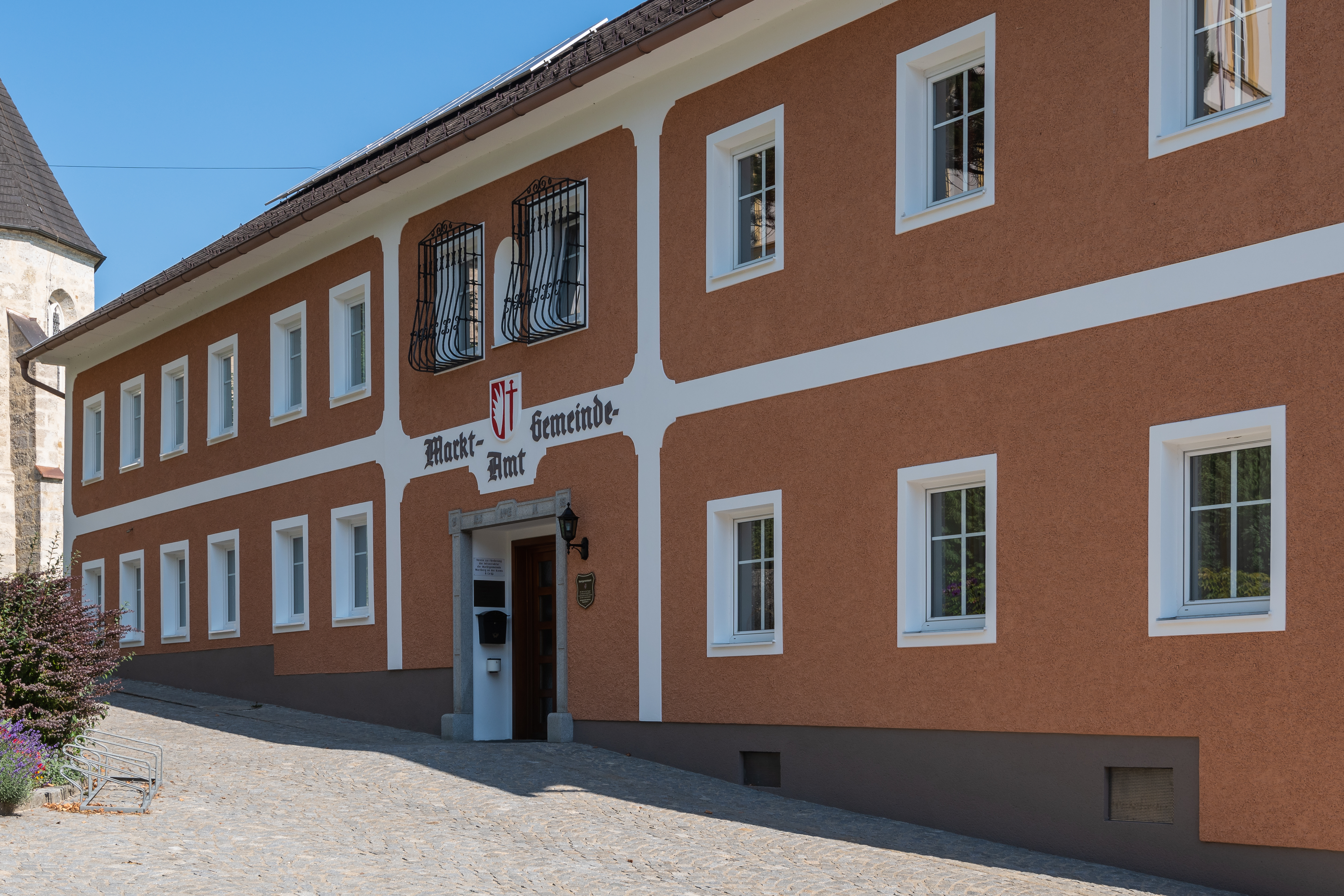 Marktgemeindeamt von Wartberg an der Krems